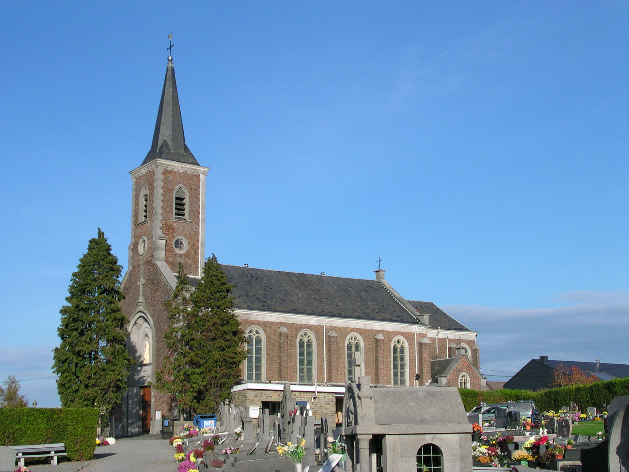 Retinne (Ortsteil von Fléron), Kirche St. Juliane